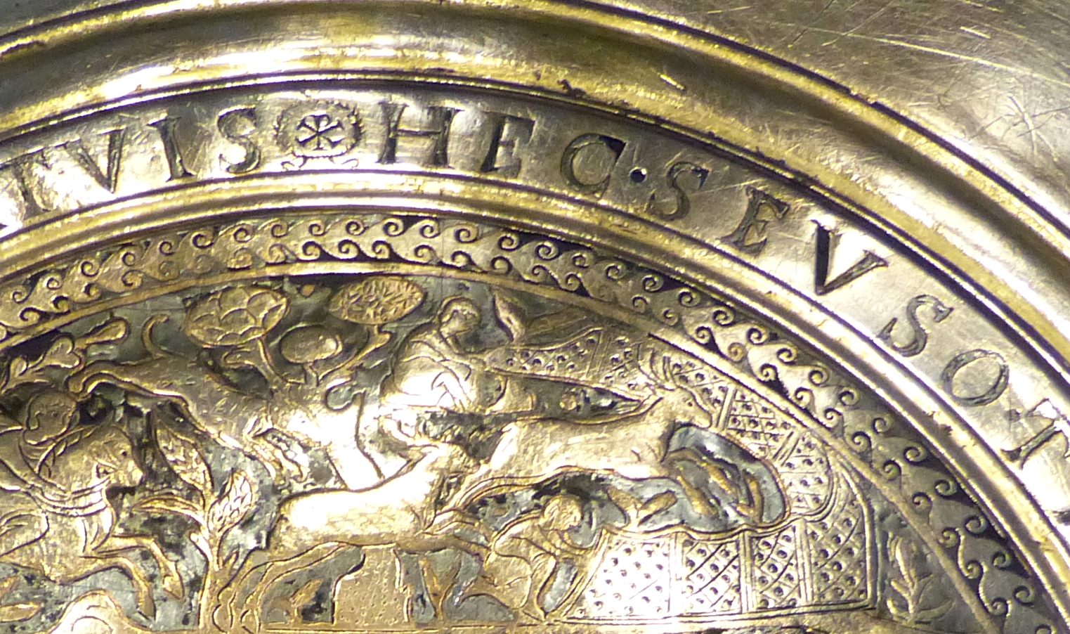 Vadásztál. Seuso kincs. A felvétel 2017. július 17-én, hétfőn készült az Országházban. Vadásztál. Lapos ezüsttál, átmérője 70,5 cm, tömege 8,8 kg. A tál közepén vadászati jelenetekkel közrefogott szabadtéri lakomajelenet. Kör alakú mezőbe foglalt díszítését latin nyelvű verses felirat keretezi. Seuso a kincs tulajdonosa lehetett aki jelentős családi esemény, talán mennyegző alkalmával kaphatta ajándékba ezt a tárgyat. A vadásztársaság egy halban gazdag Balaton partján lakomázik. A víz felett Pelso (Balaton). A tál a 4. század közepe táján készülhetett. Seuso, Pannonia helytartója birtokának széle a legközelebbi Balatonpart a Partfő, Balatonkenesén.